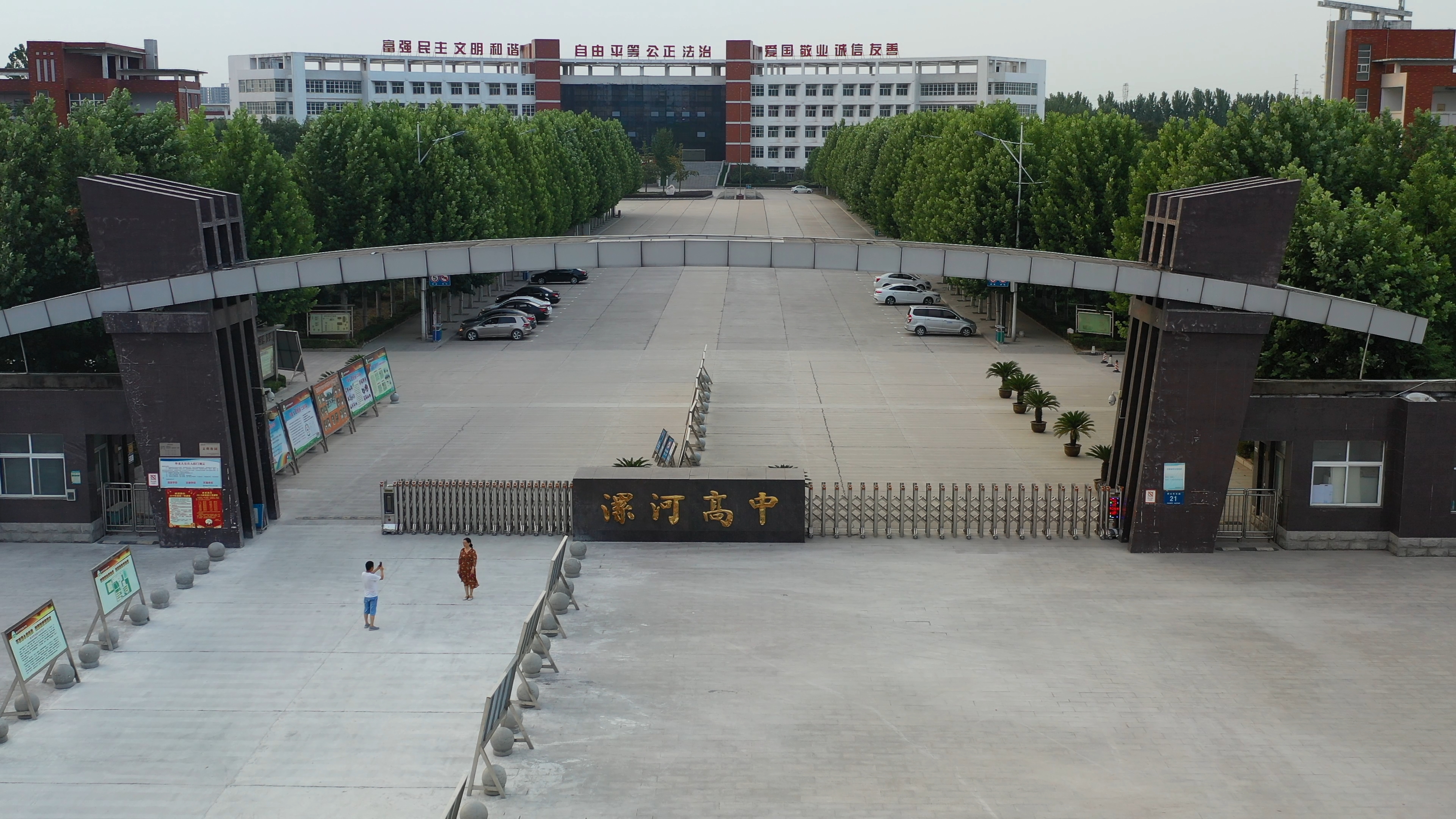 中文（中国大陆）: 漯河市高级中学北校区校门